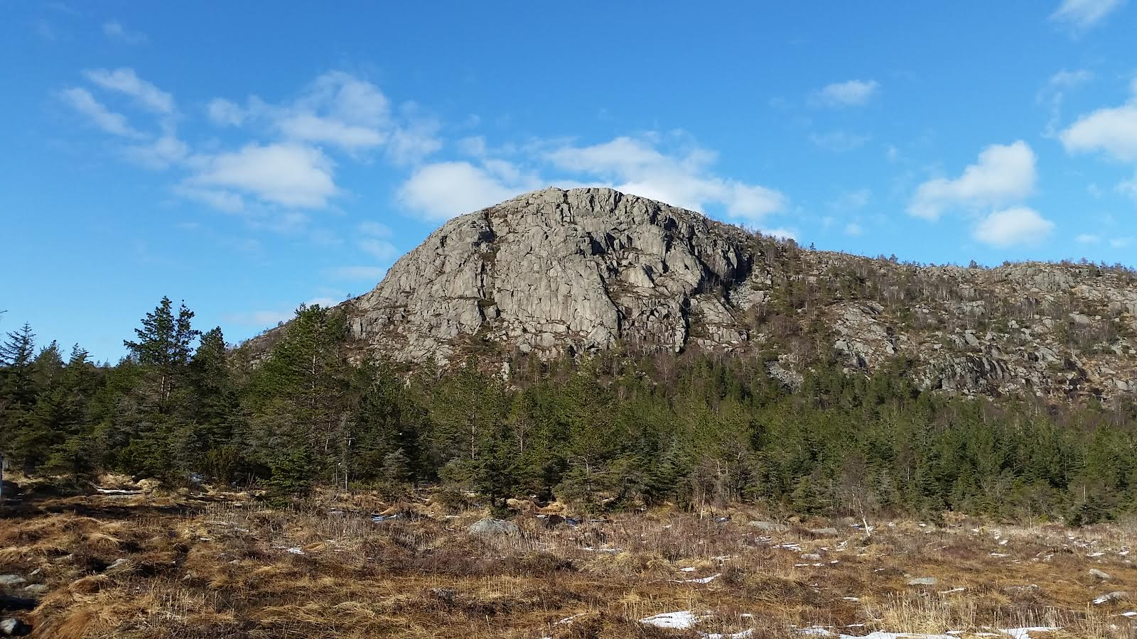 Gramsfjellet, sett fra Regnarvatnet